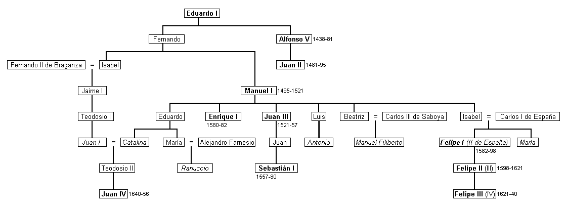 Árbol genealógico de los aspirantes al trono durante la crisis sucesoria de Portugal.